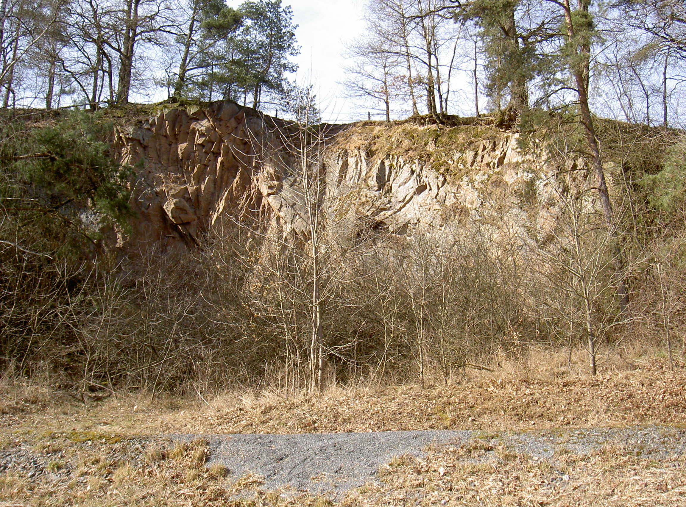 Felswand am Kolm, ehemaliger Steinbruch